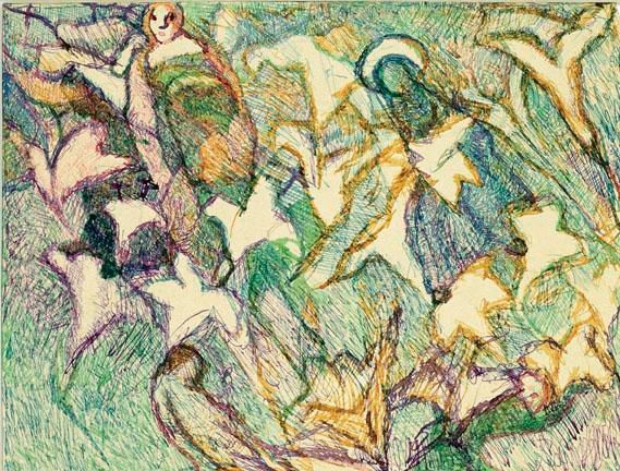 картины швейцарского живописца и графика Луи Суттера (фр. Louis Soutter, 1871 — 1942)